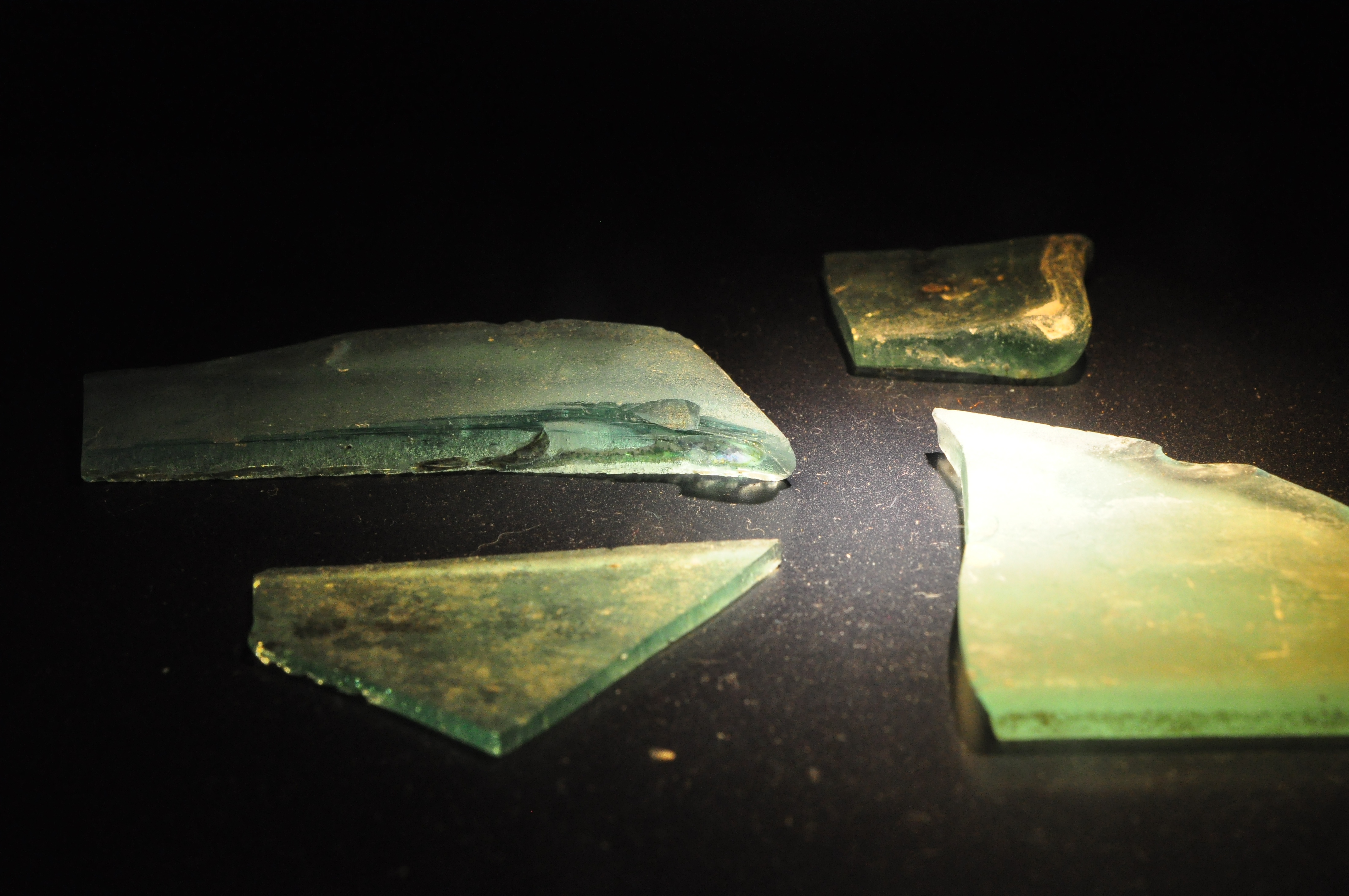 Exponat aus der Thermengasse im einstigen römischen vicus Turicum (Zürich) : Reste von Fensterglass, die ebenfalls dem Bad I zugeordnet werden können. (gemäss Beschriftung in der Vitrine)